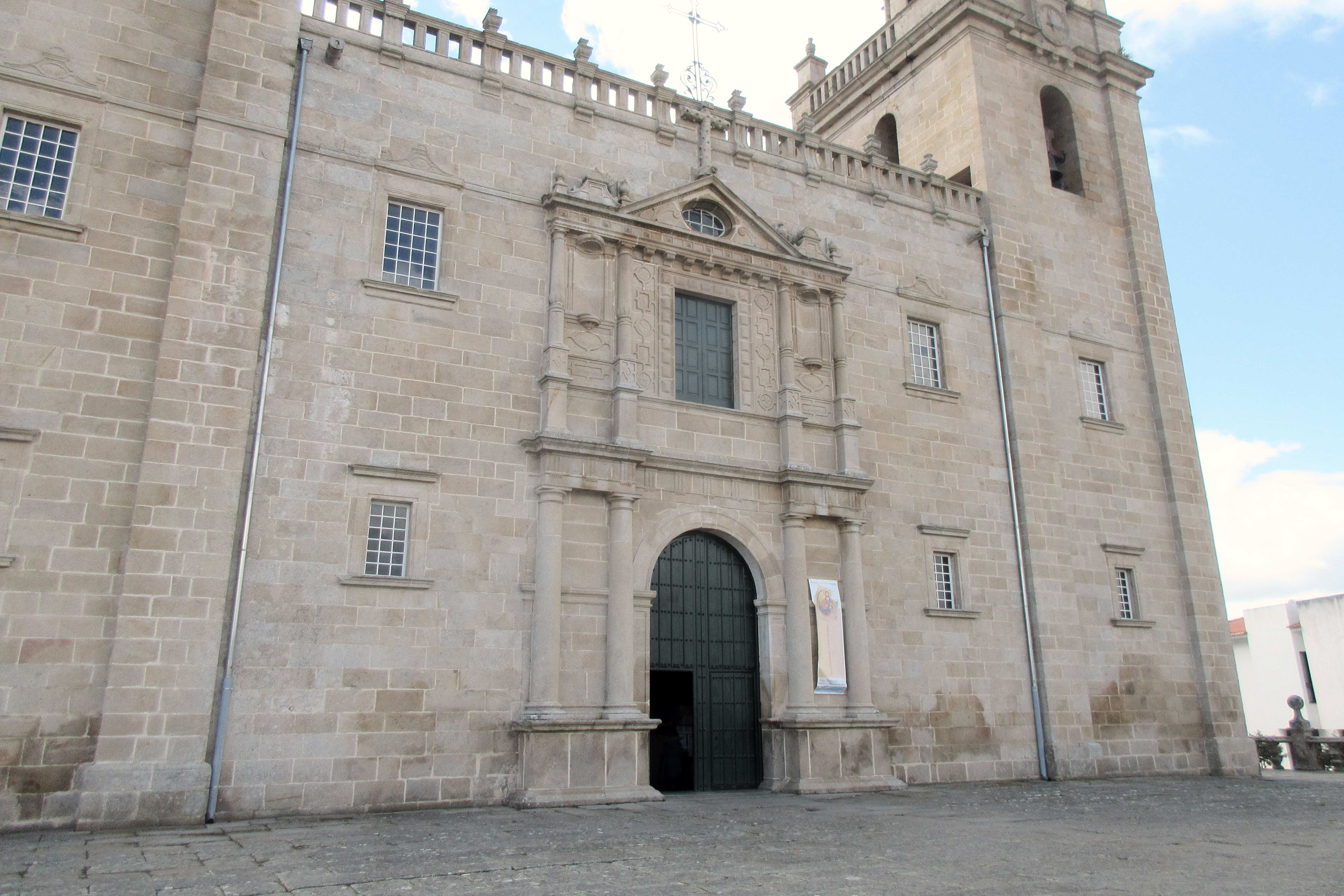 Frontispicio y portada de la Catedral de Miranda do Douro.